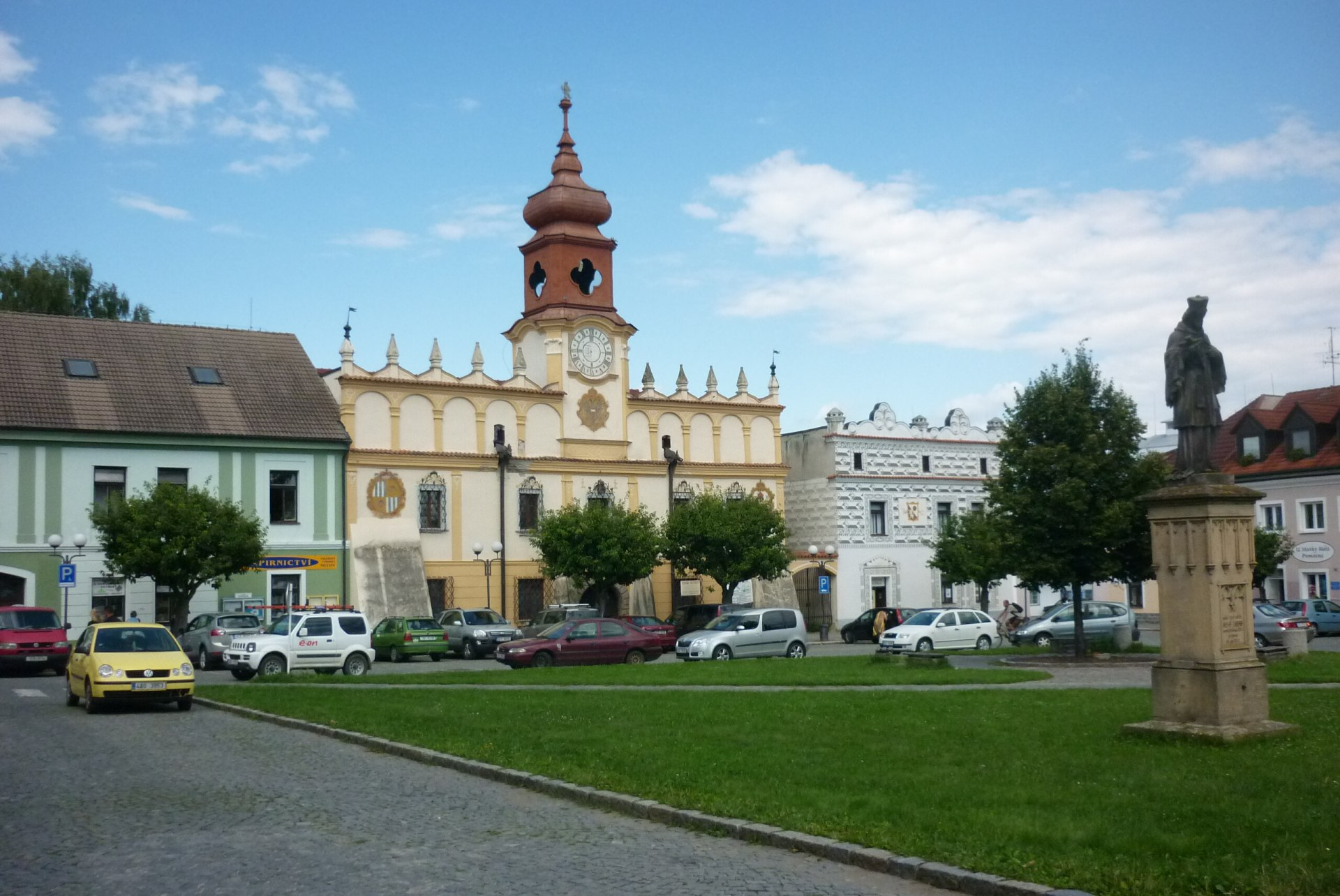 Náměstí T. G. Masaryka ve Veselí nad Lužnicí